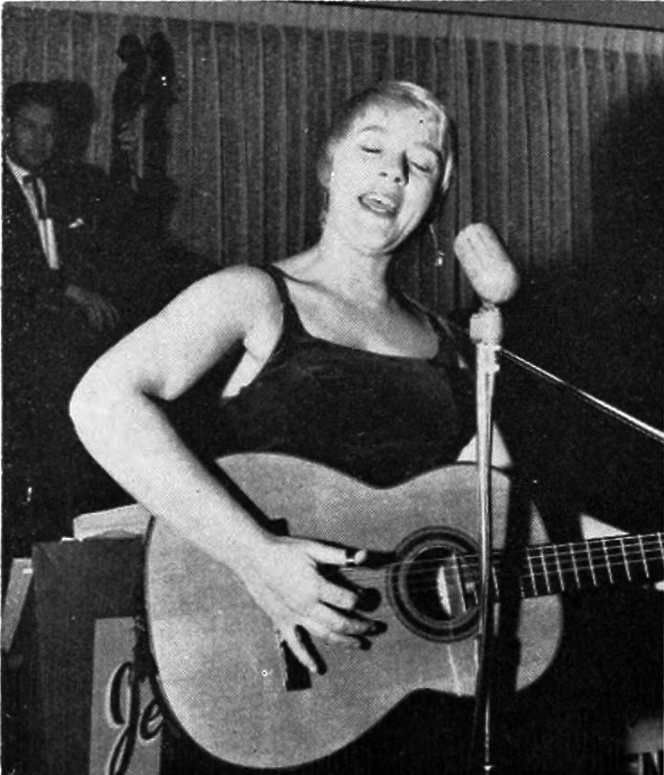 Folksinger Barbara Dane performing at UCLA's 1960 "Dublin Ball".